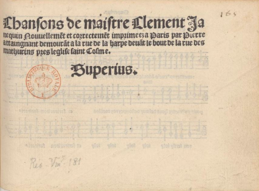 Tite page of Janequin's Chansons (Paris : Attaingnant, [1528)].